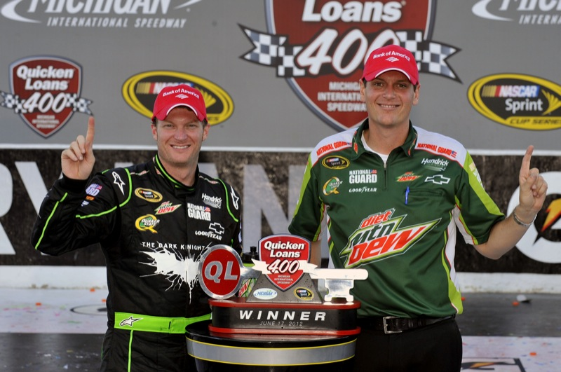 Dale Jr di victory lane Michigan